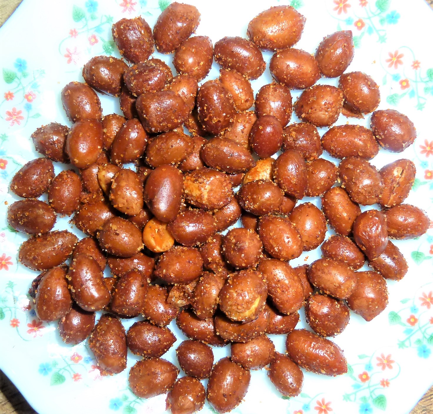 వేరుశనగ గుళ్ళు (నూనెలో వేయించి ఉప్పు, కారం వేసినవి)